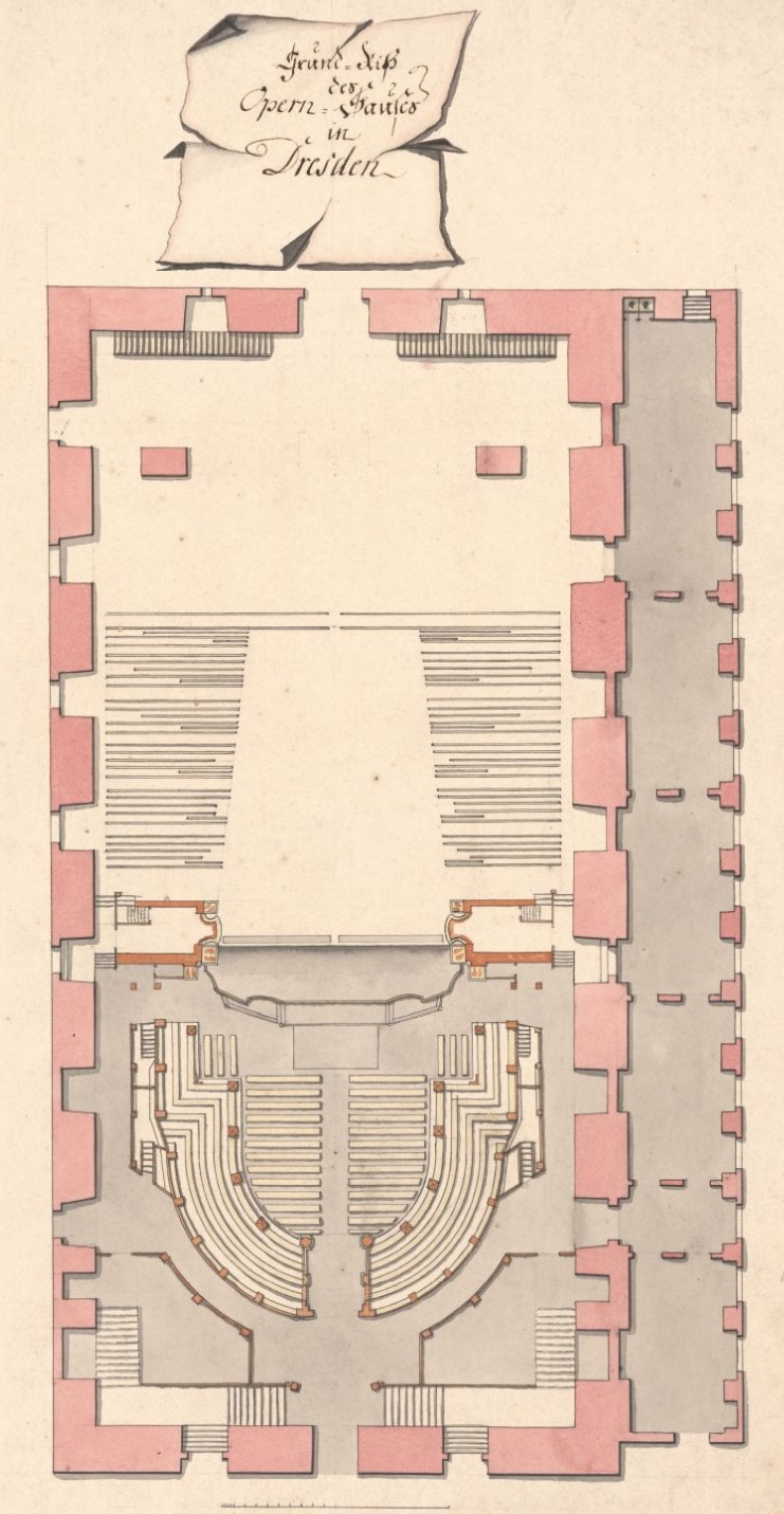 Opernhaus am Zwinger, Grundriss. Unbekannter Zeichner, 18. Jahrhundert. Ausführung: Feder, Pinsel in Wasserfarbe/Papier. Größe: 51 x 36 cm. Titel: "Grundriß des Opern Hauses in Dresden". Unbekannter Zeichner